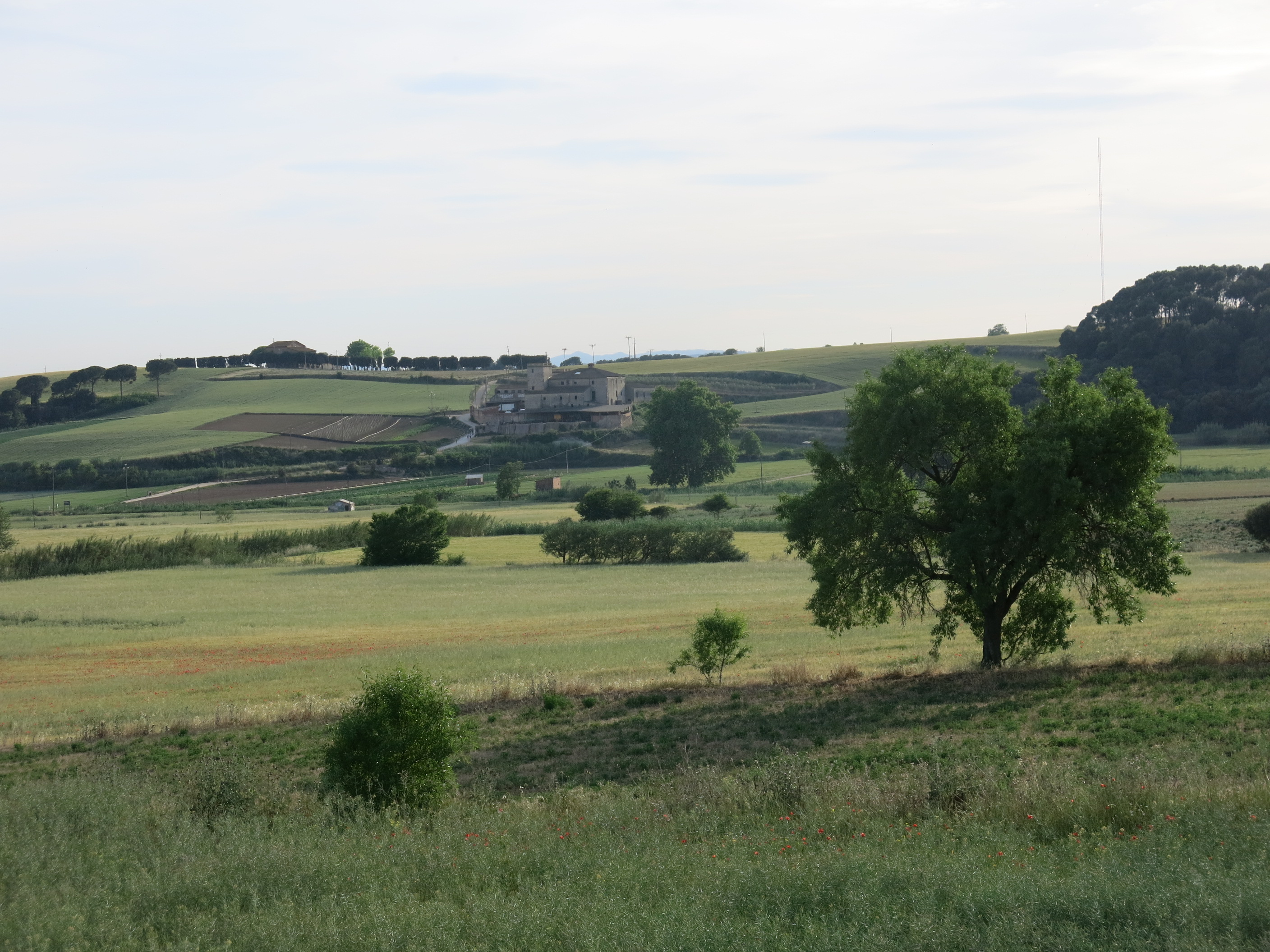 Gallecs This is a a photo of a natural area in Catalonia, Spain, with id: ES510277